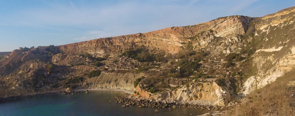 Wschodnia część zatoki, z widoczną synkliną na górze i formacją Blue Clay u podnóża.